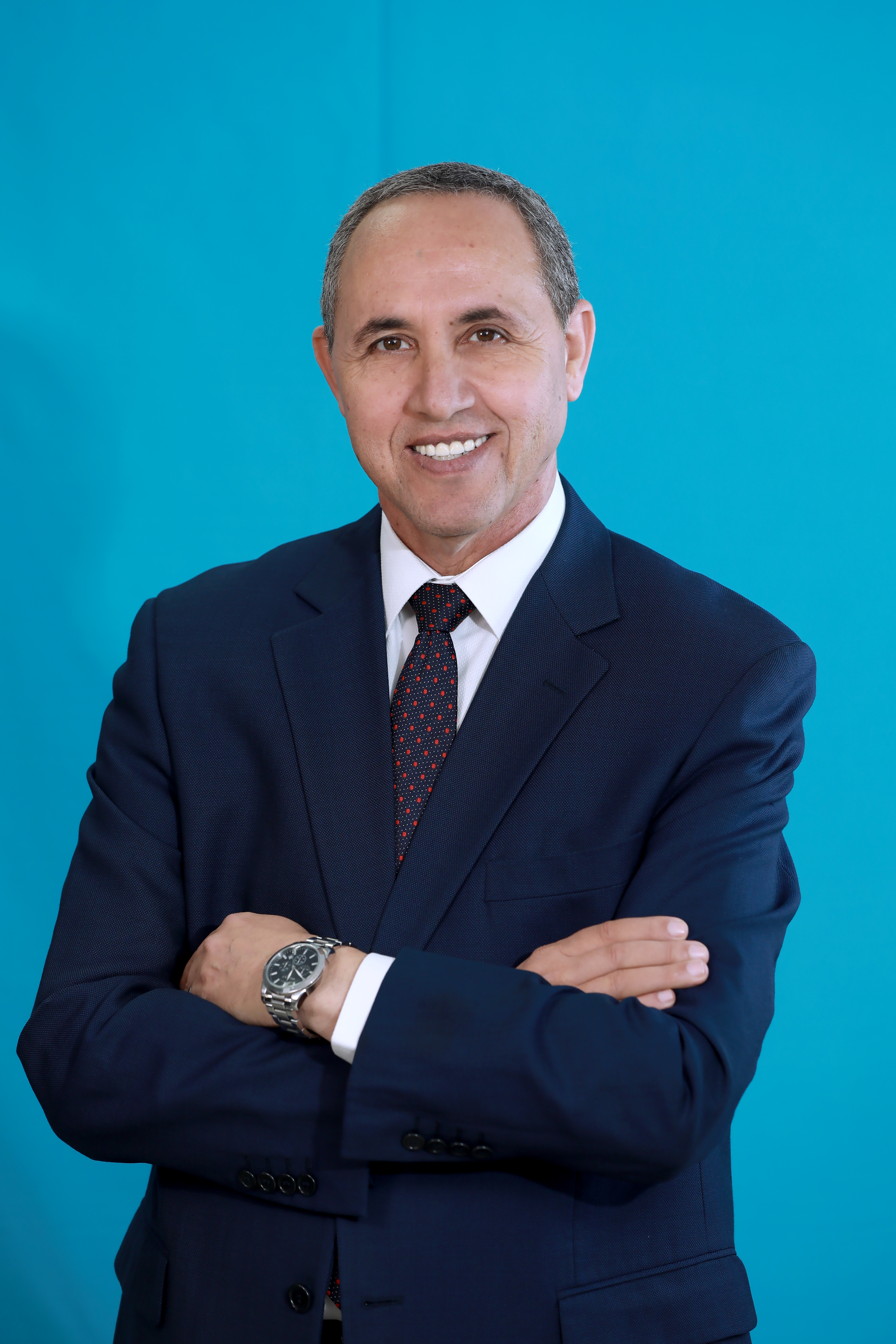 عز الدين ميهوبي مترشح للإنتخابات الرئاسية الجزائرية 12 ديسمبر 2019